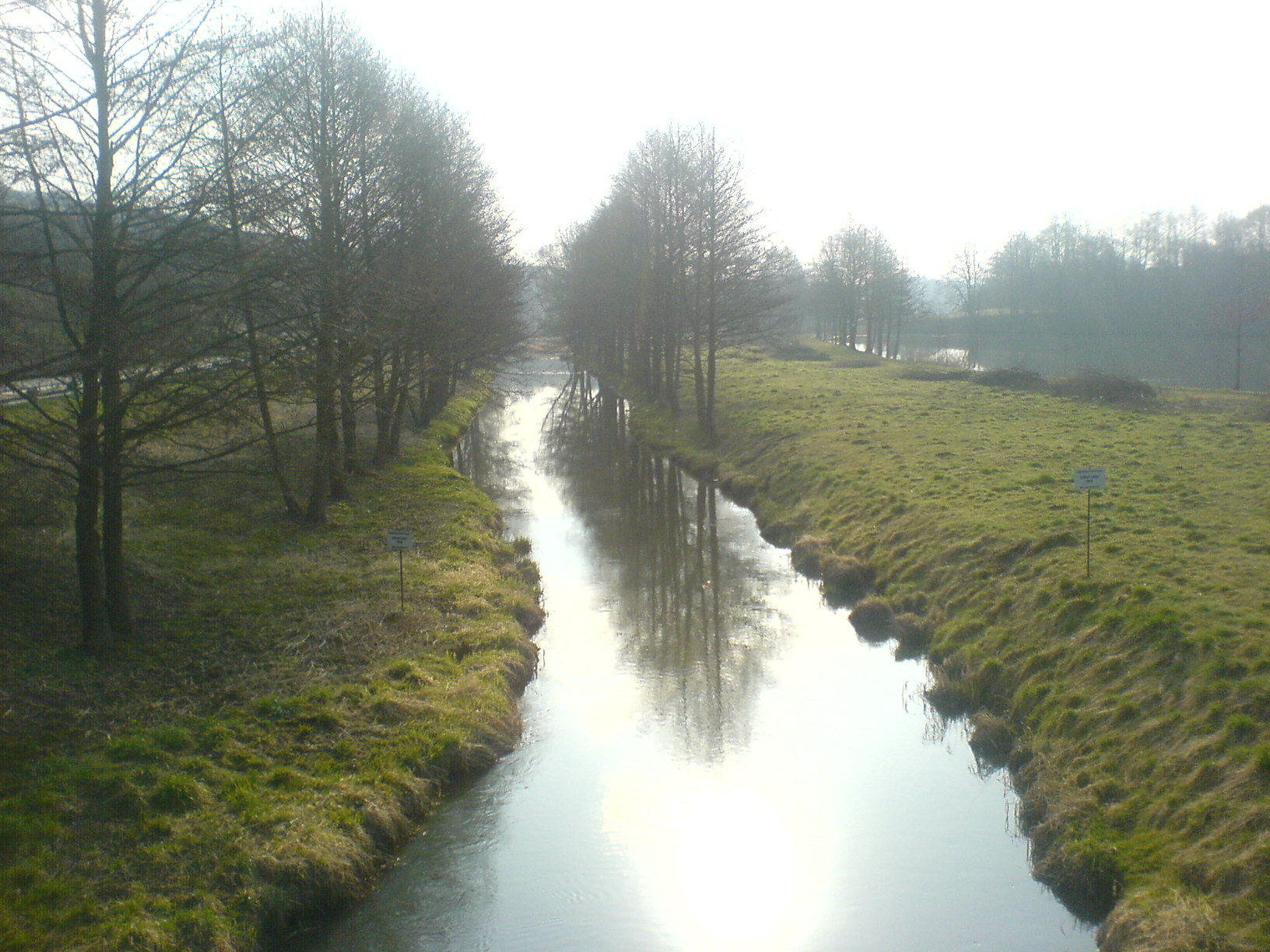 Řeka Křetínka protékající mezi Křetínem a Lazinovem